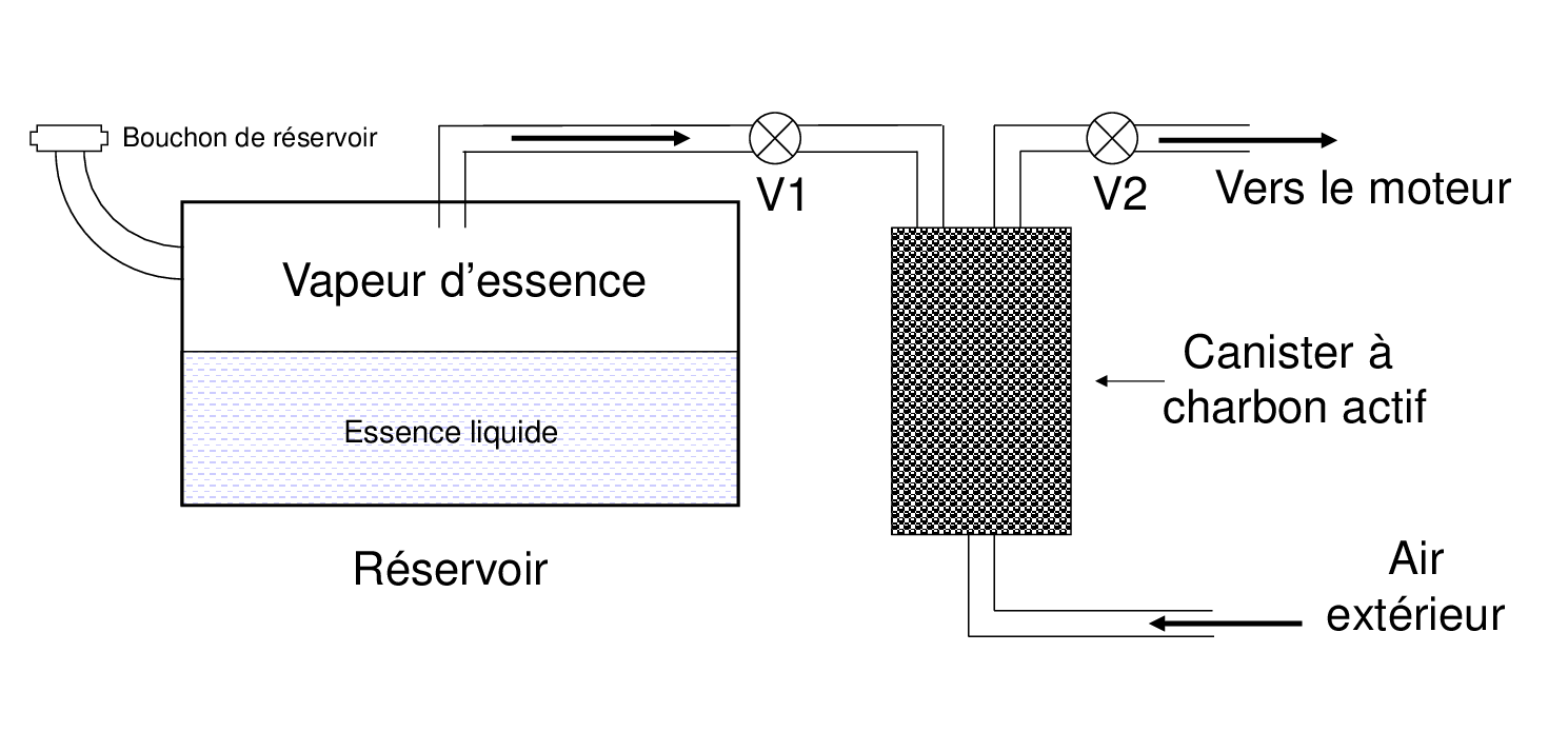 Les vapeurs d'essence (essentiellement du butane) produites dans le ciel du réservoir, notamment en cas d'échauffement (véhicule au soleil), s'échappent par la vanne V1 ouverte vers le canister où elles sont adsorbées (vanne V2 fermée). La désorption s'effectue à chaque démarrage du véhicule par aspiration d'air extérieur qui passe dans le canister et désorbe les vapeurs fixées. Le flux résultant est dirigé par la vanne V2 ouverte (V1 fermée) vers le moteur où les vapeurs son brulées. Il n'y a donc aucune vapeur d'essence relarguée à l'atmosphère.